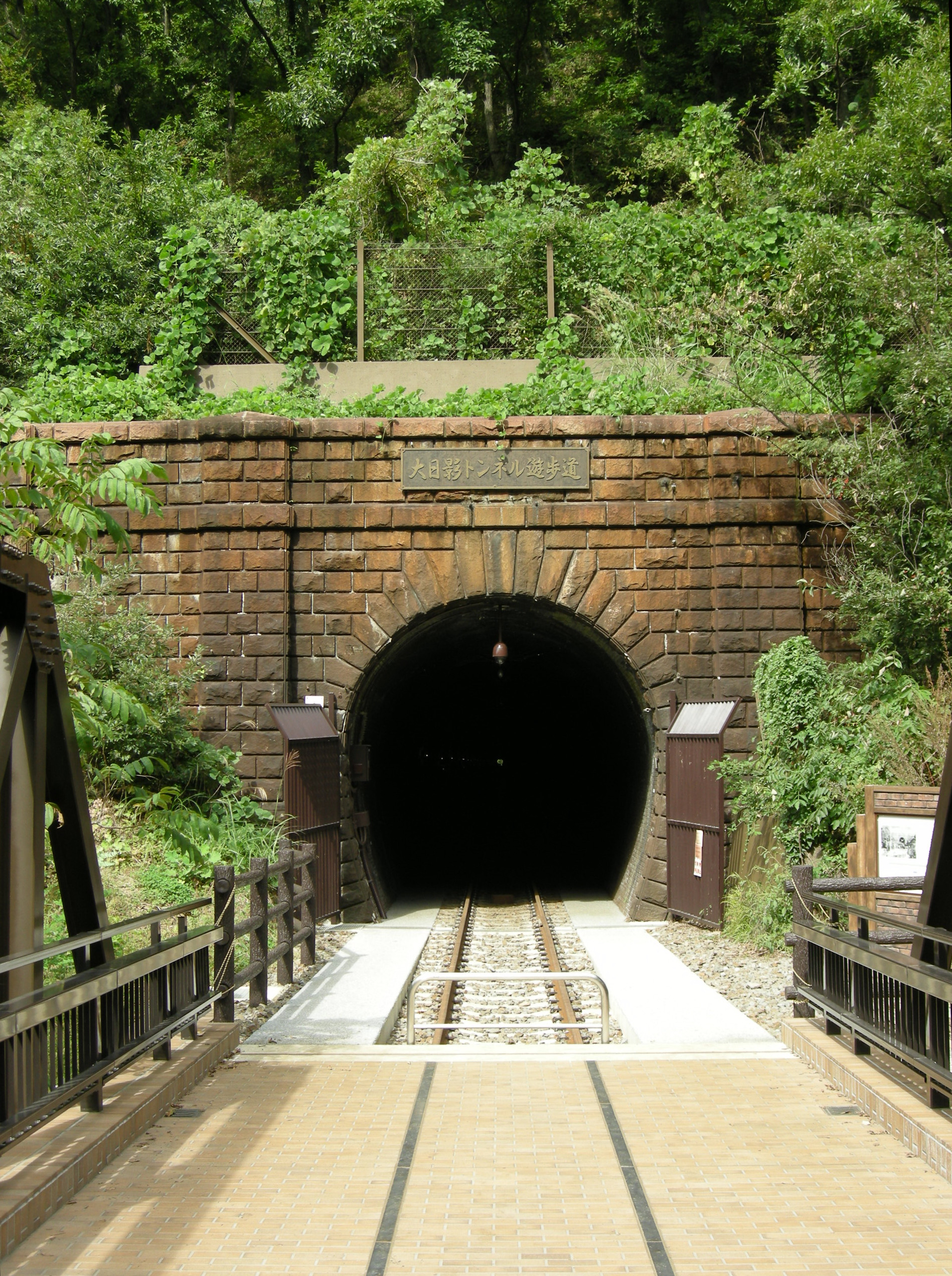 Oohikagetunnel-yuhodo